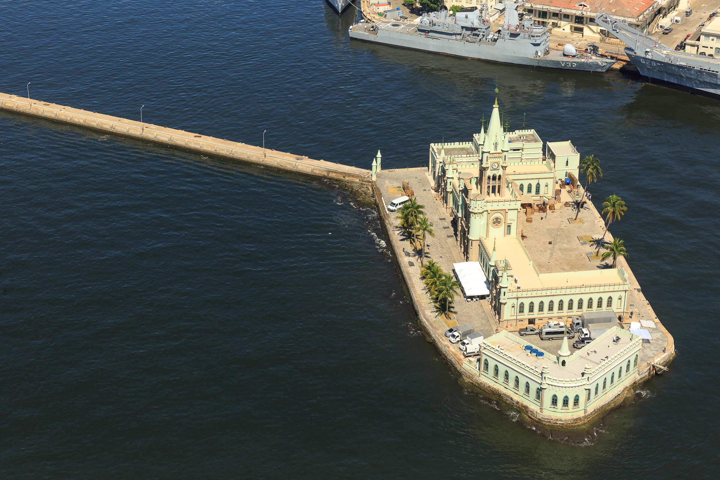 Antiga Ilha Fiscal localizada na cidade do Rio de Janeiro